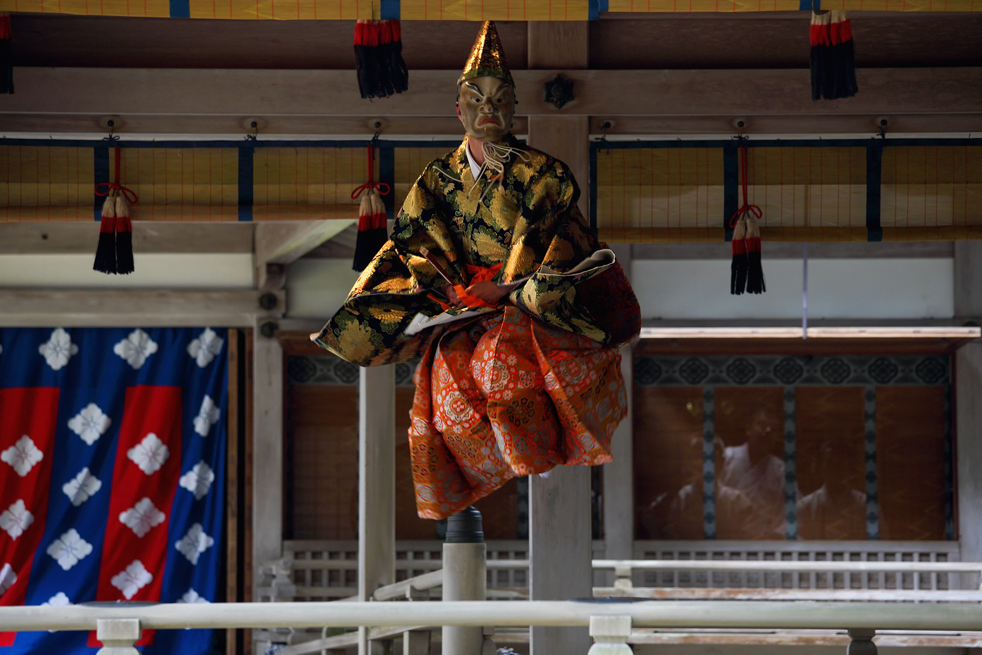 越後一宮彌彦神社の妻戸大神例祭（妃神例祭）に舞殿で奏される、舞楽「大々神楽」の「神面」（大人面舞一人）。国重要無形民俗文化財に指定されている。 国重要無形文化財に指定されている。